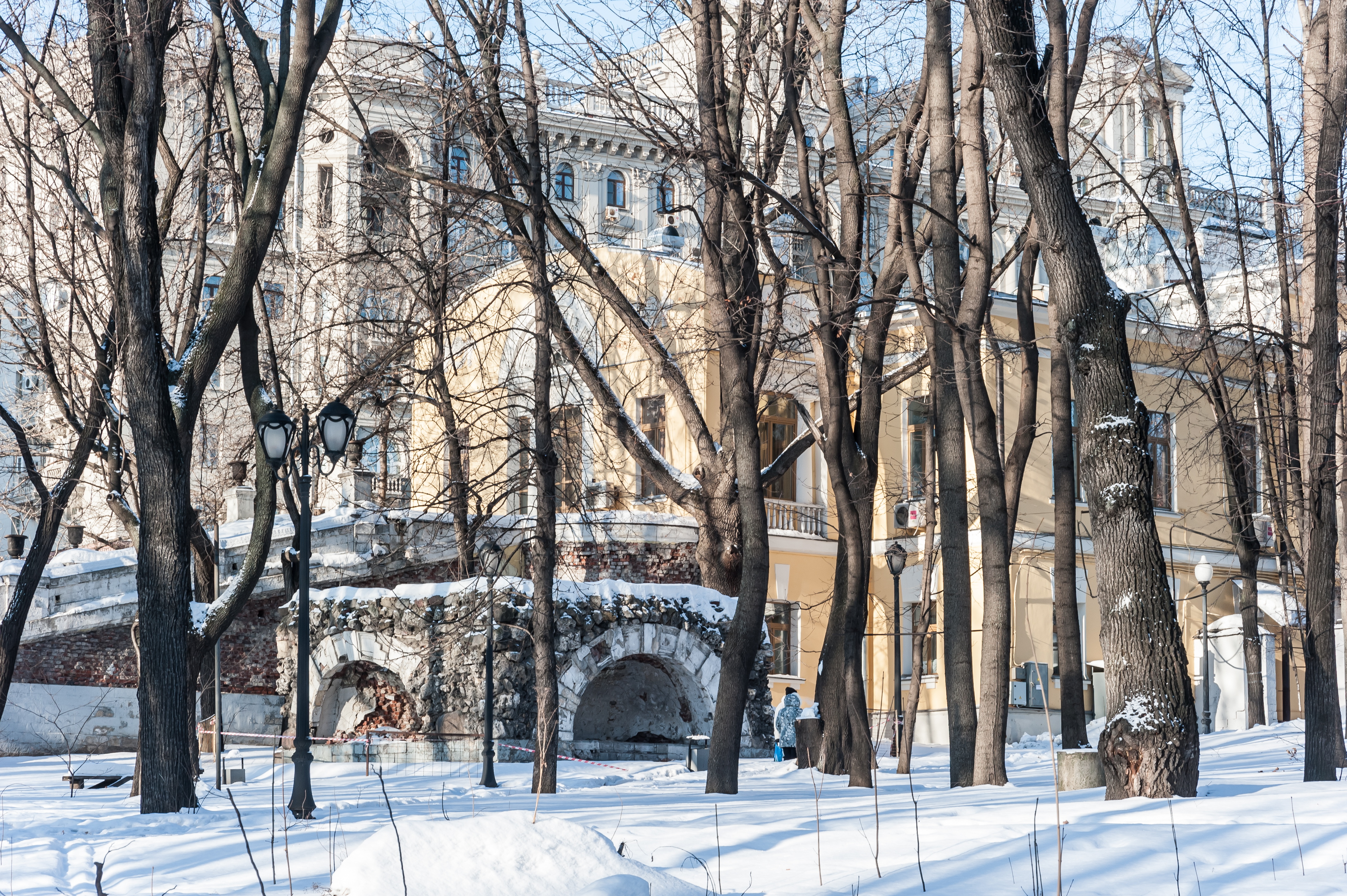 Москва. Земляной вал, 53